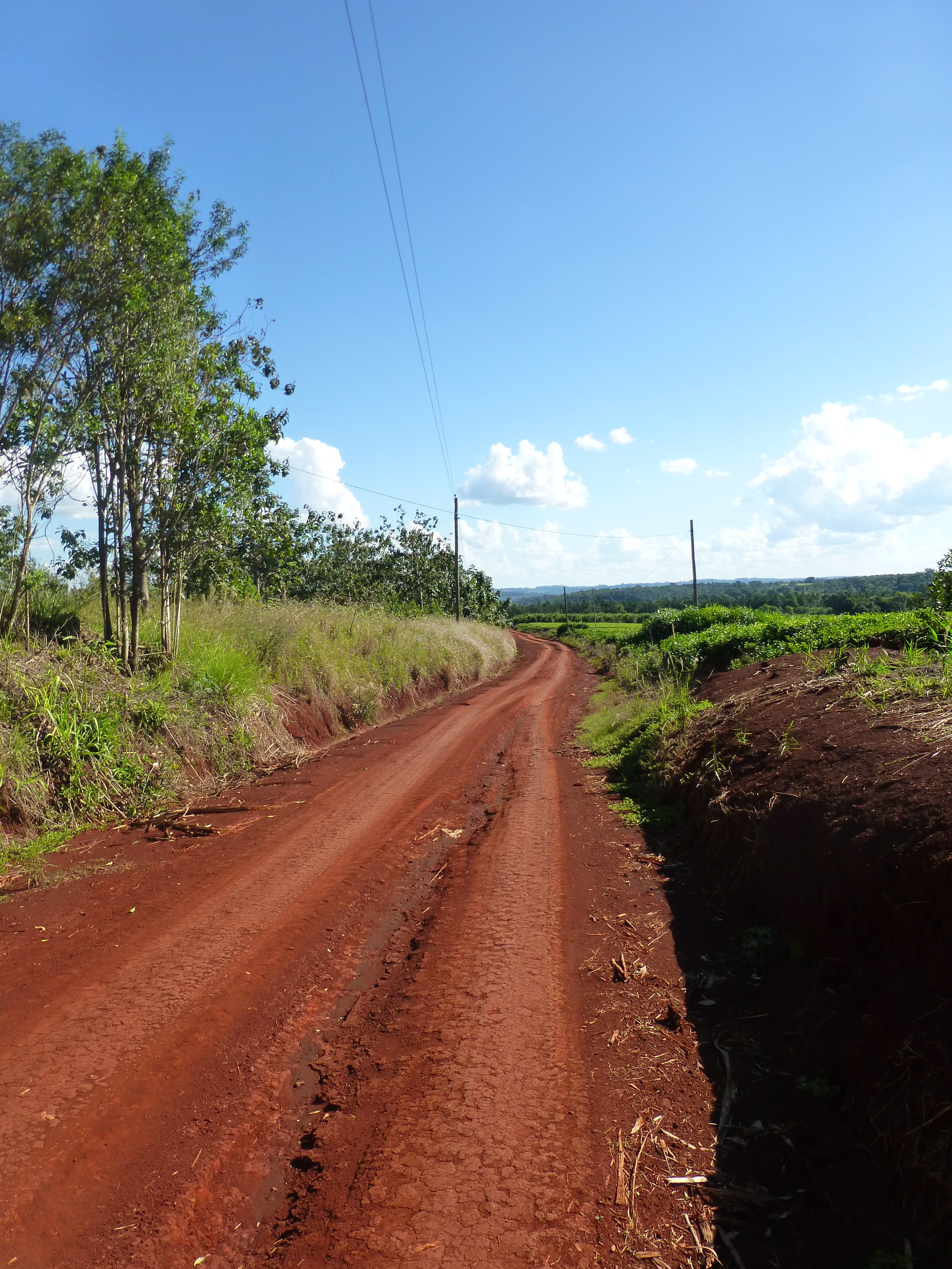 Camino rural en la localidad de Villa Bonita, provincia de Misiones.